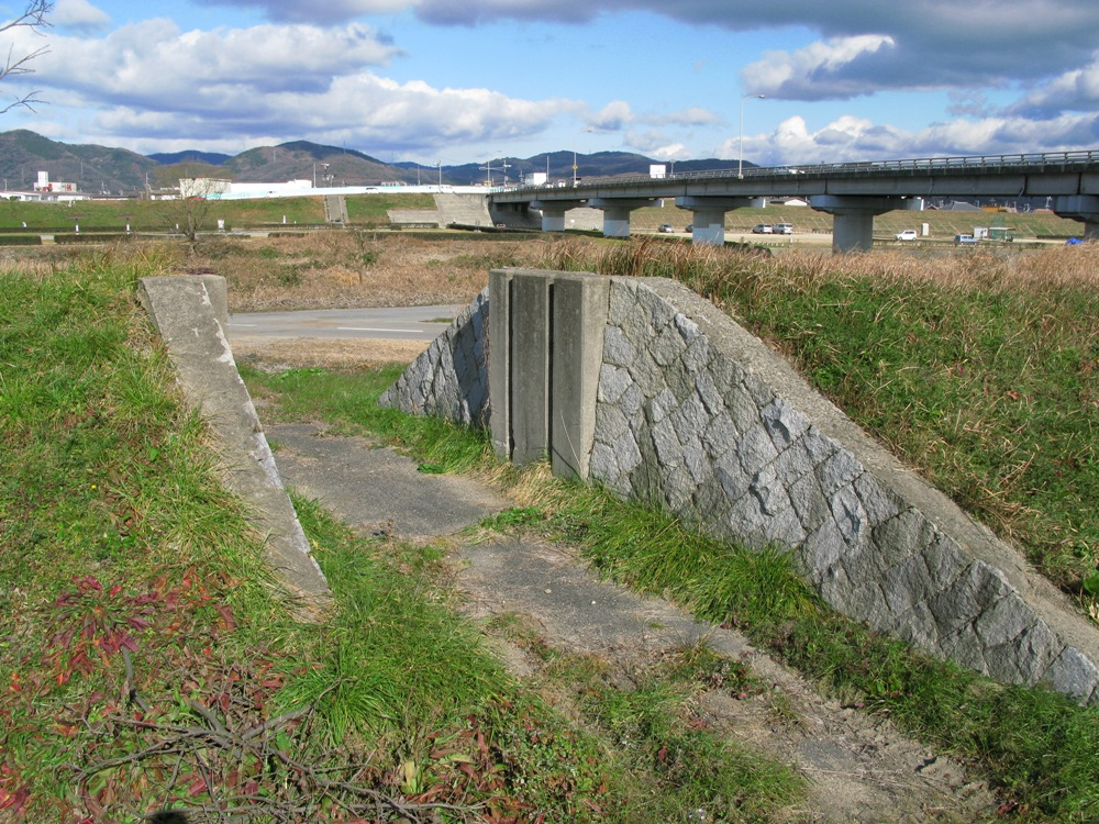 百間川（岡山県）でかつて見られた陸閘。岡山市中区米田地内の百間川河川敷内に復元保存されているもの。